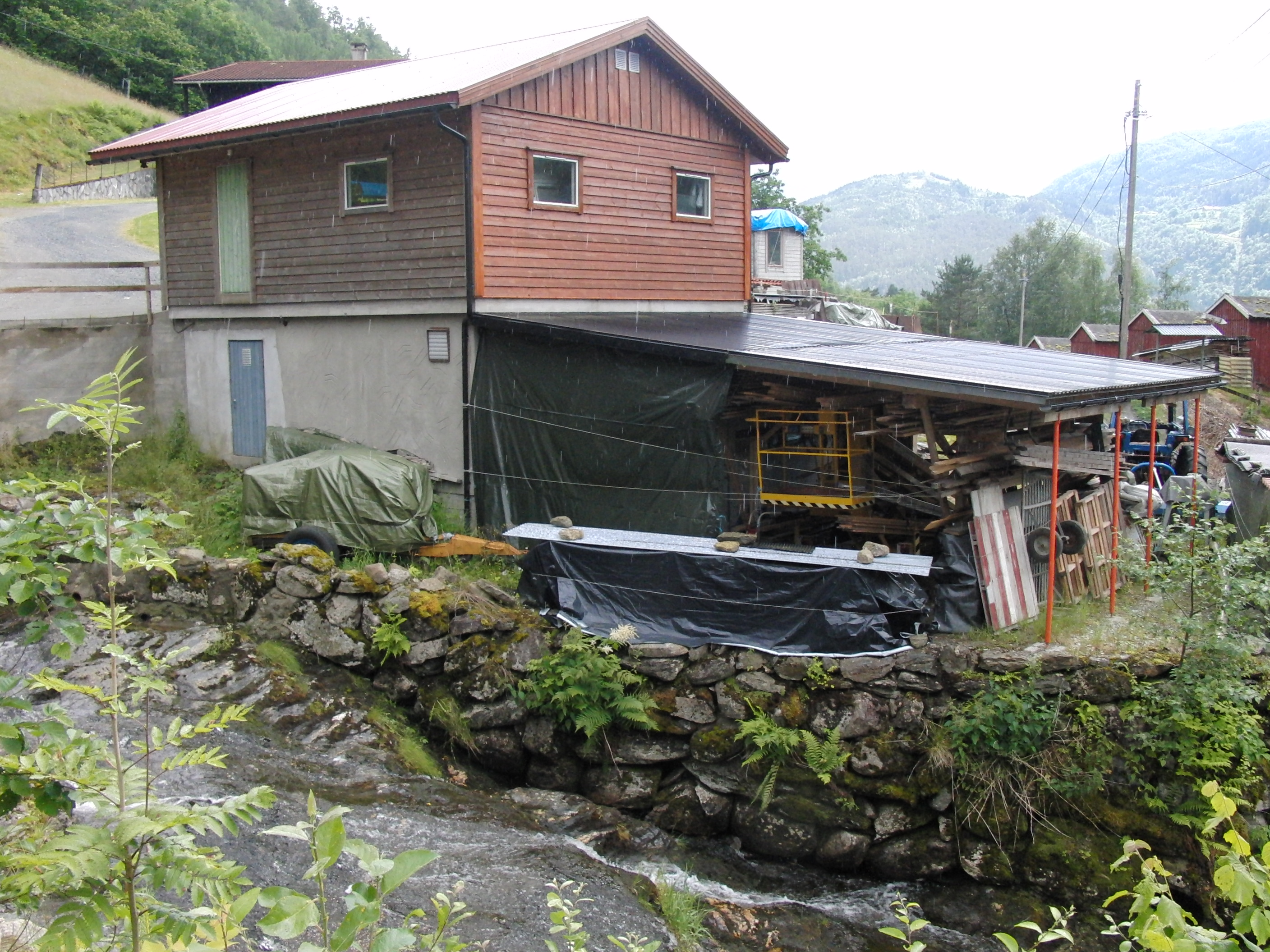 Aga kraftverk